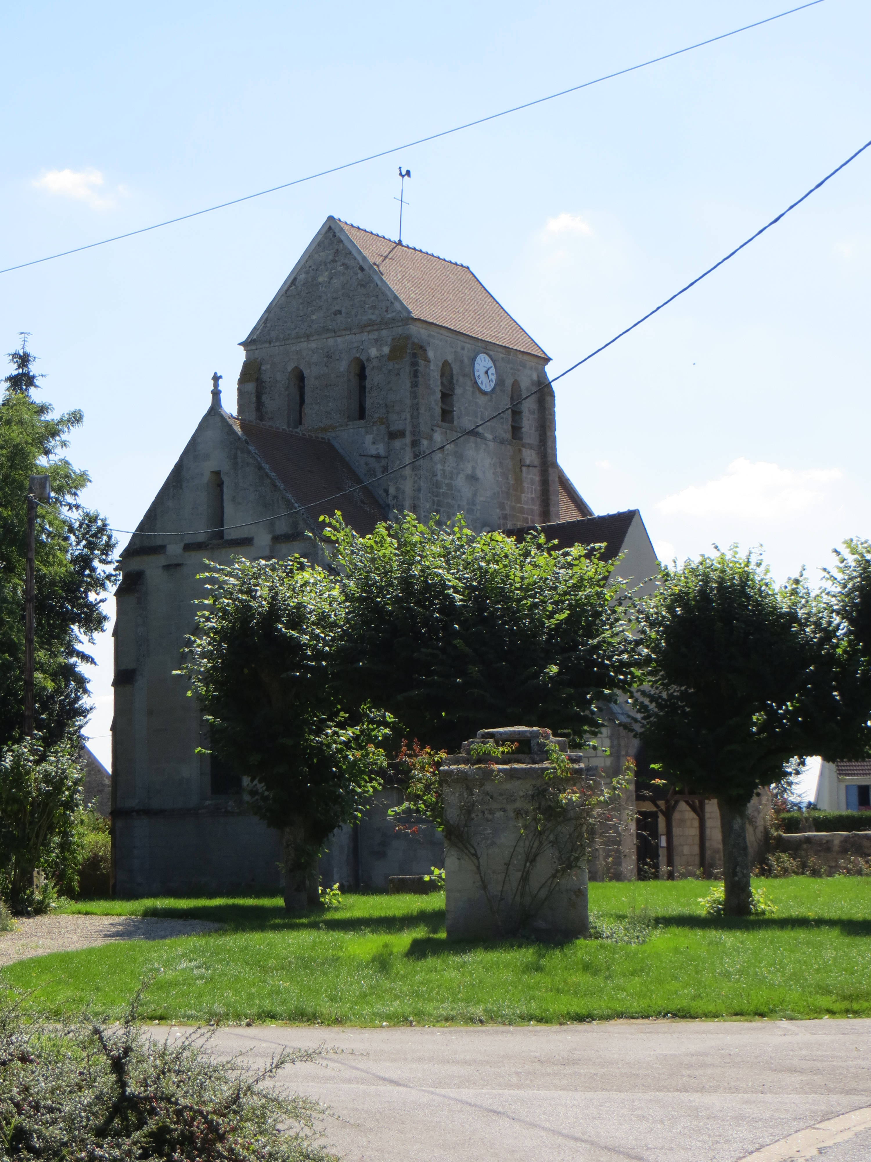 Vue générale de l'église